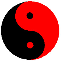 Thái Cực đồ